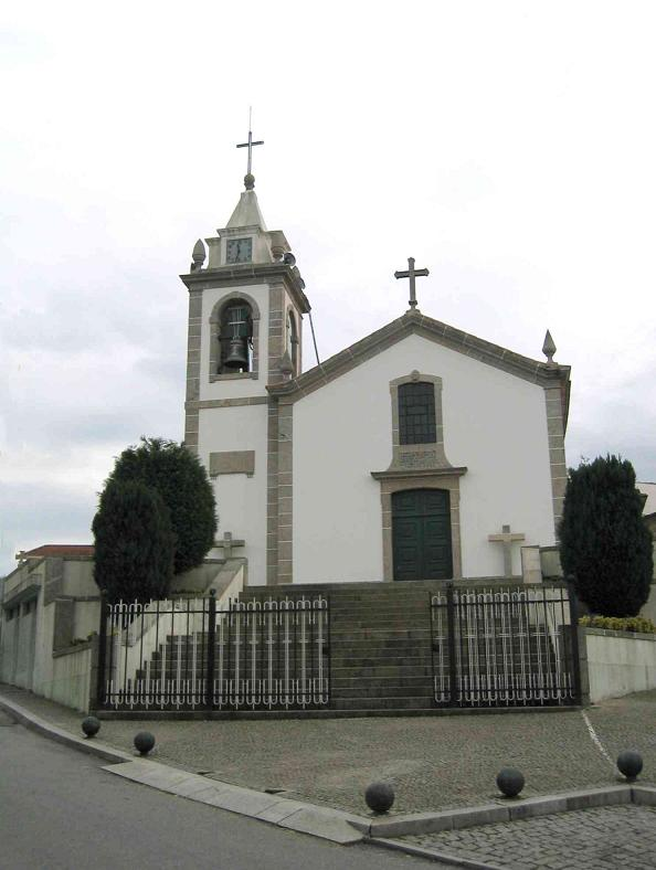 Igreja de São Brás - Baguim do Monte - Portugal